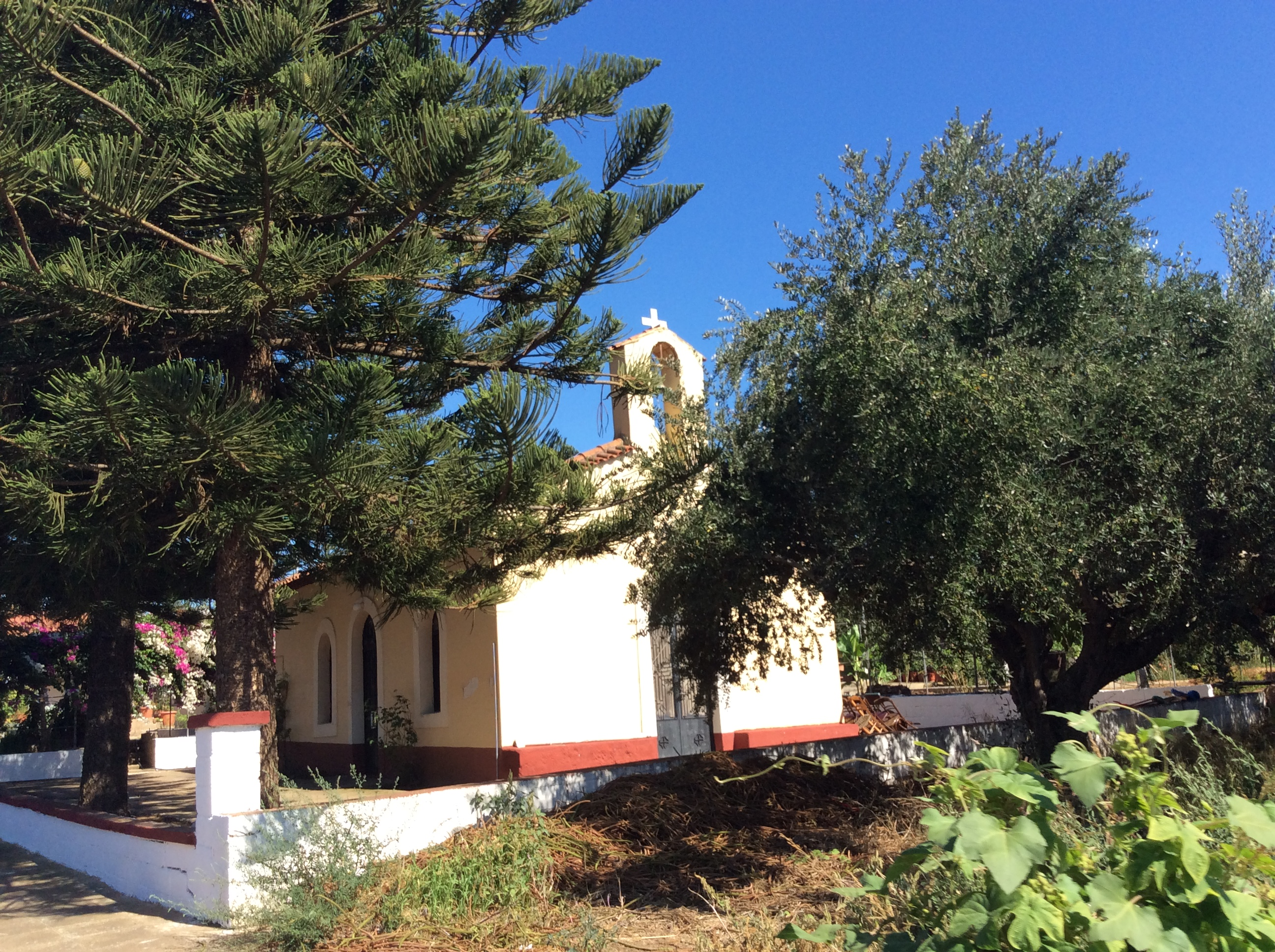 Χοχλαστή Μεσσηνίας. Το εκκλησάκι του Άη Γιάννη του Πρόδρομου της Χοχλαστής.